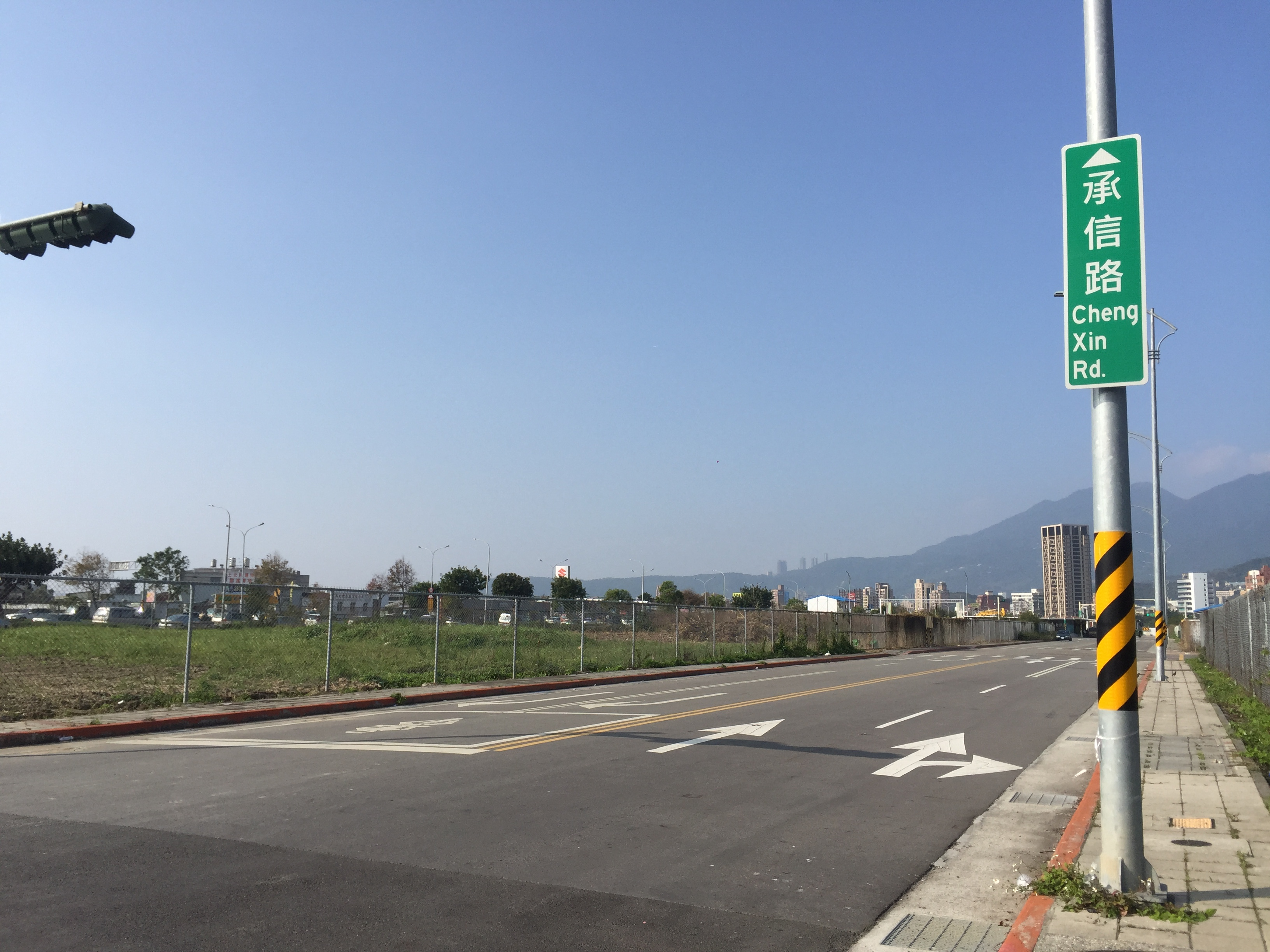 台北市北投區士林北投科技園區新設道路 承信路口